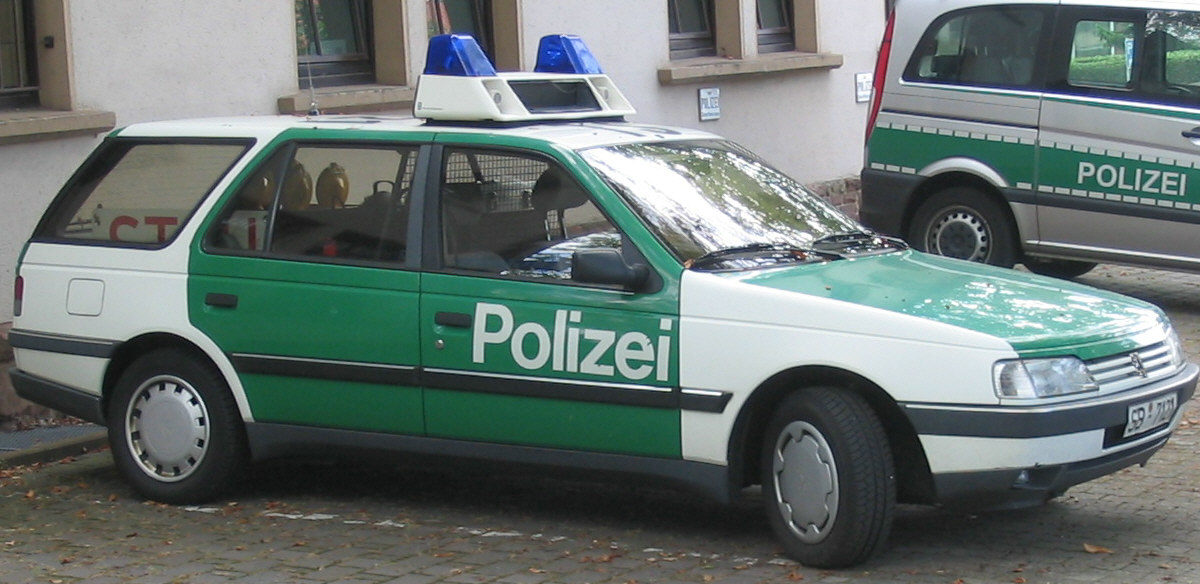 Peugeot 405 Break Polizeifahrzeug Saarland